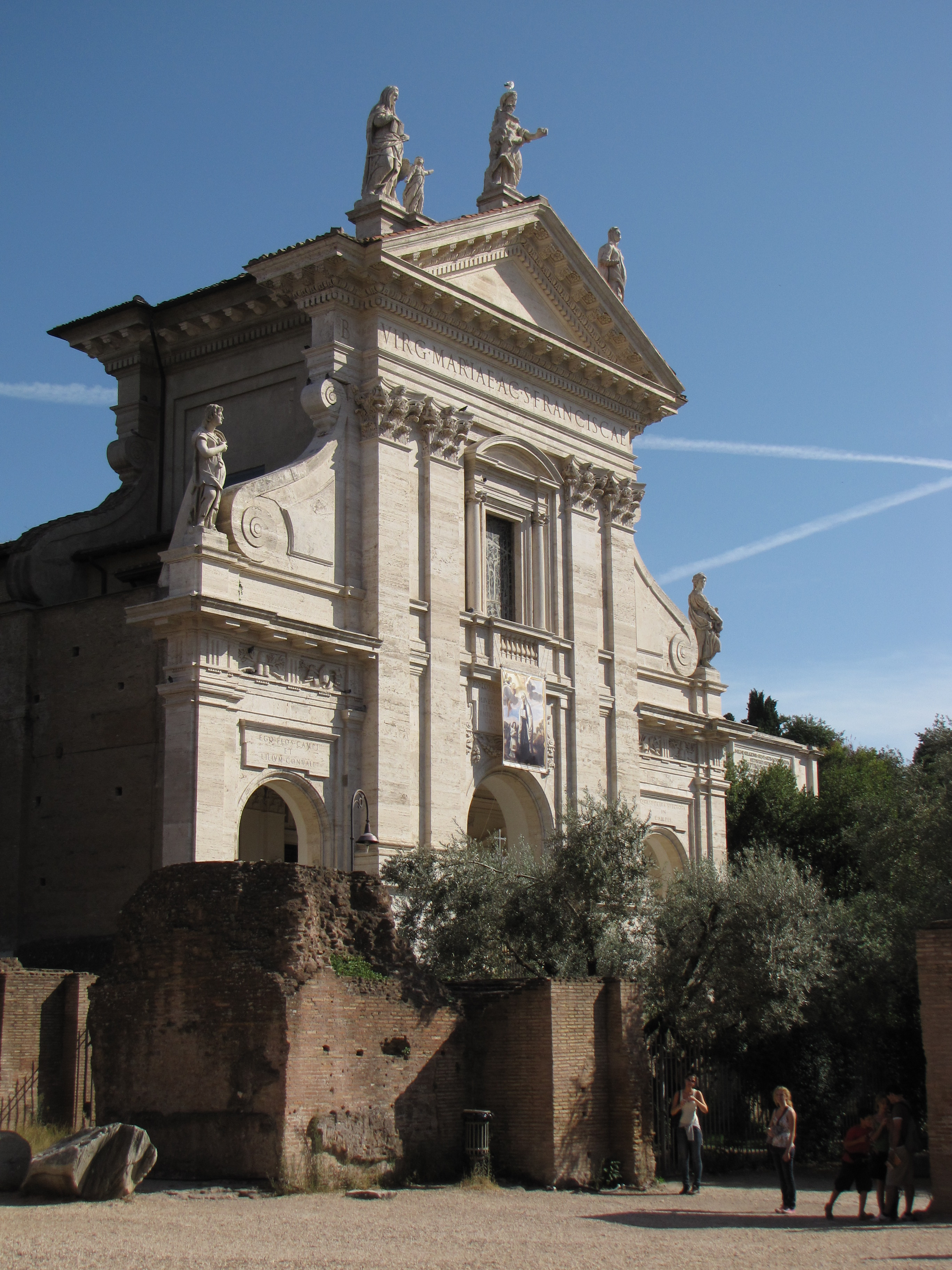 Basilica di Santa Francesca Romana, a Roma.